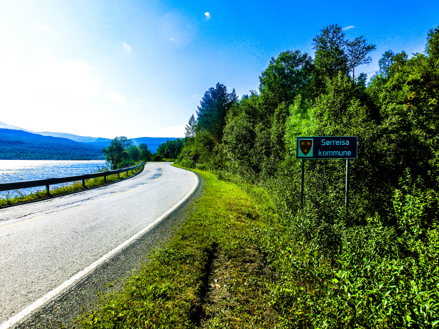 Skilt Sørreisa kommune